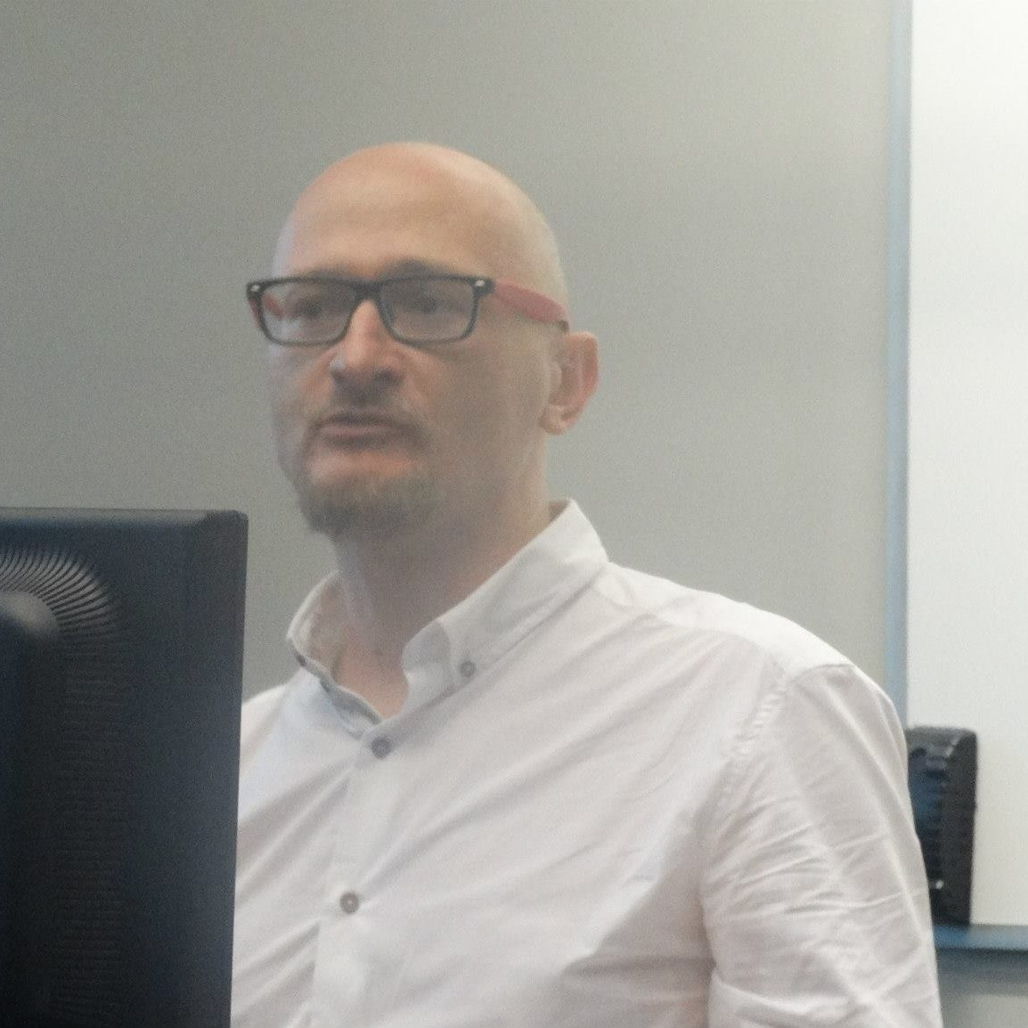 Data i miejsce urodzenia: 12 lipiec 1975 Łódź Alma Mater: Uniwersytet im. Adama Mickiewicza w Poznaniu